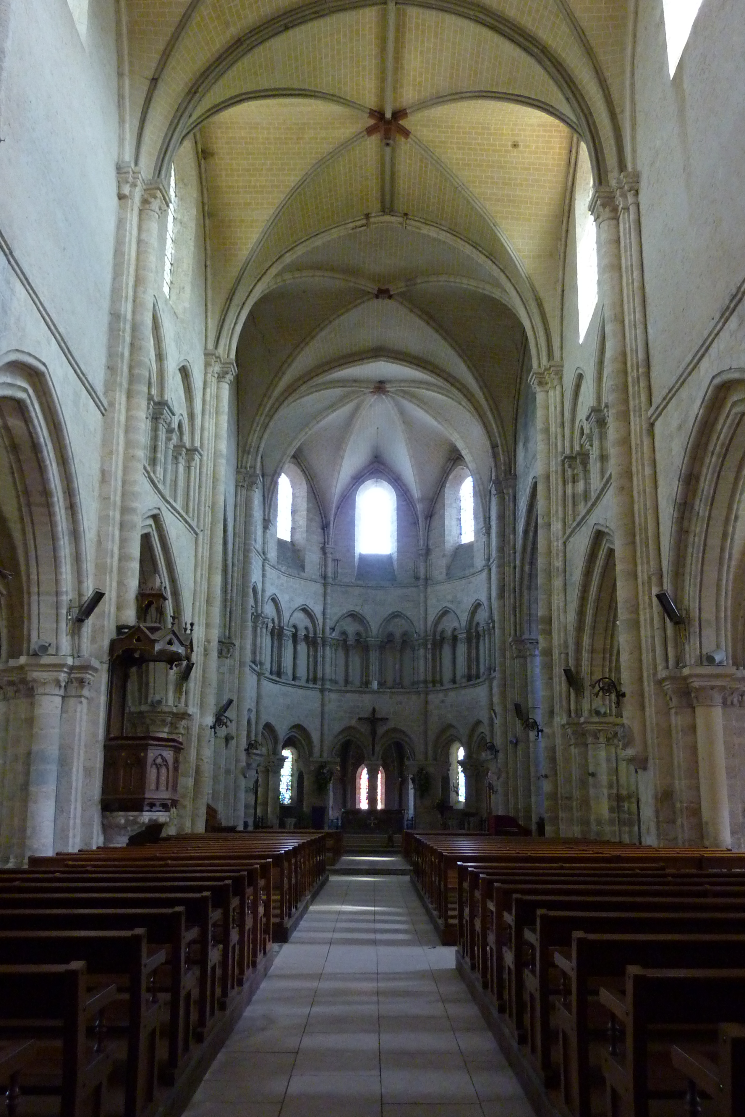 katholische Kirche Saint-Martin in Étampes